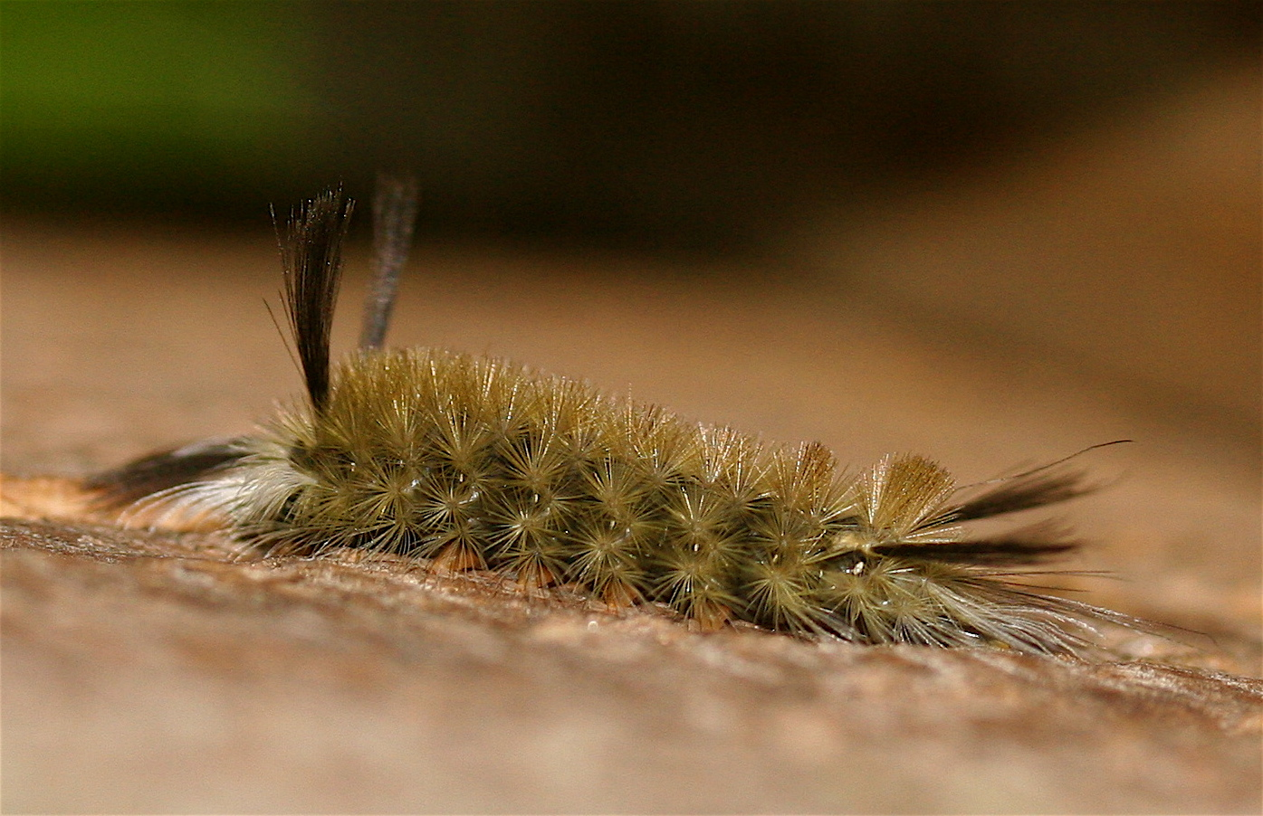 Lepidoptera - Arctiidae - probably Halysidota tessellaris caterpillar